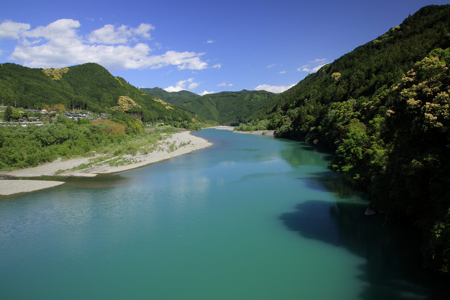 天竜川（浜松市天竜区、2012年）